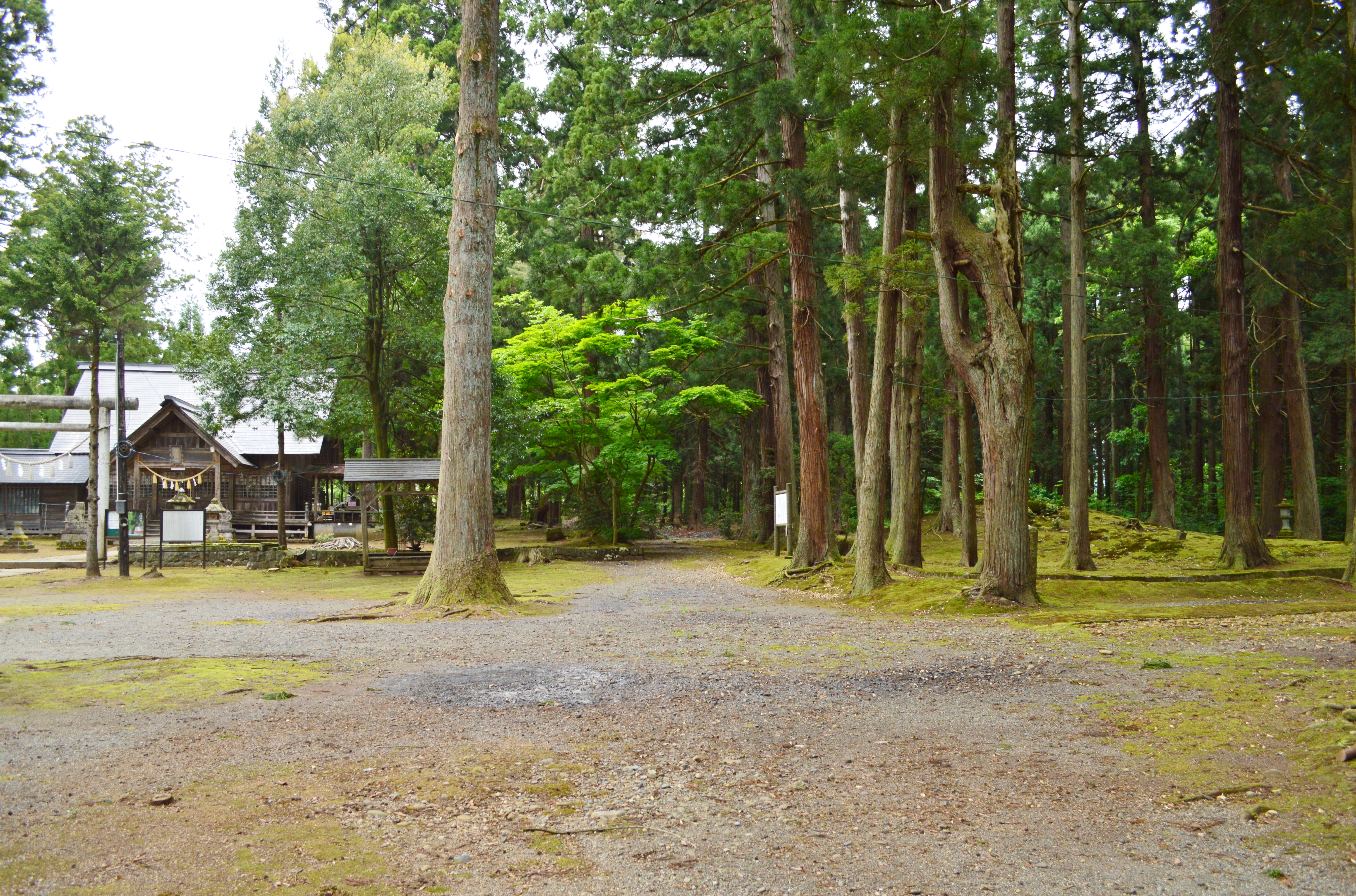 菅原神社 (上越市) 社殿と菅原古墳